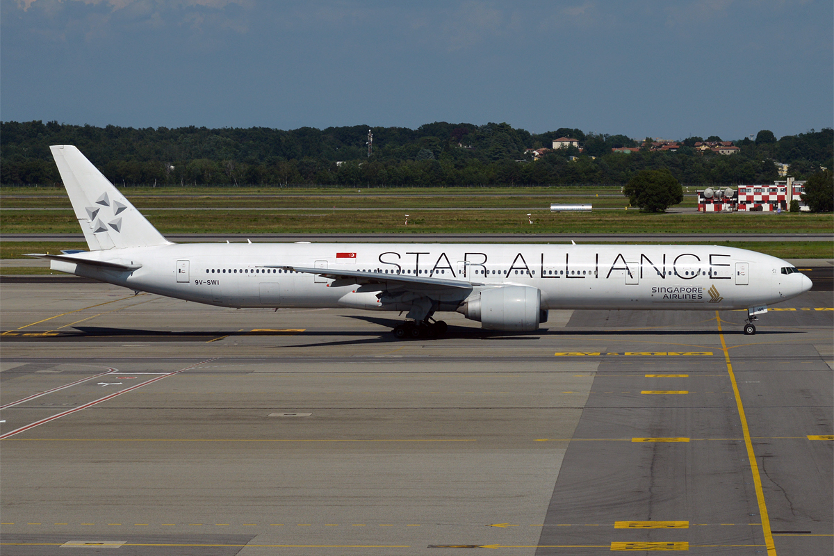 Singapore Airlines, 9V-SWI, Boeing 777-312 ER